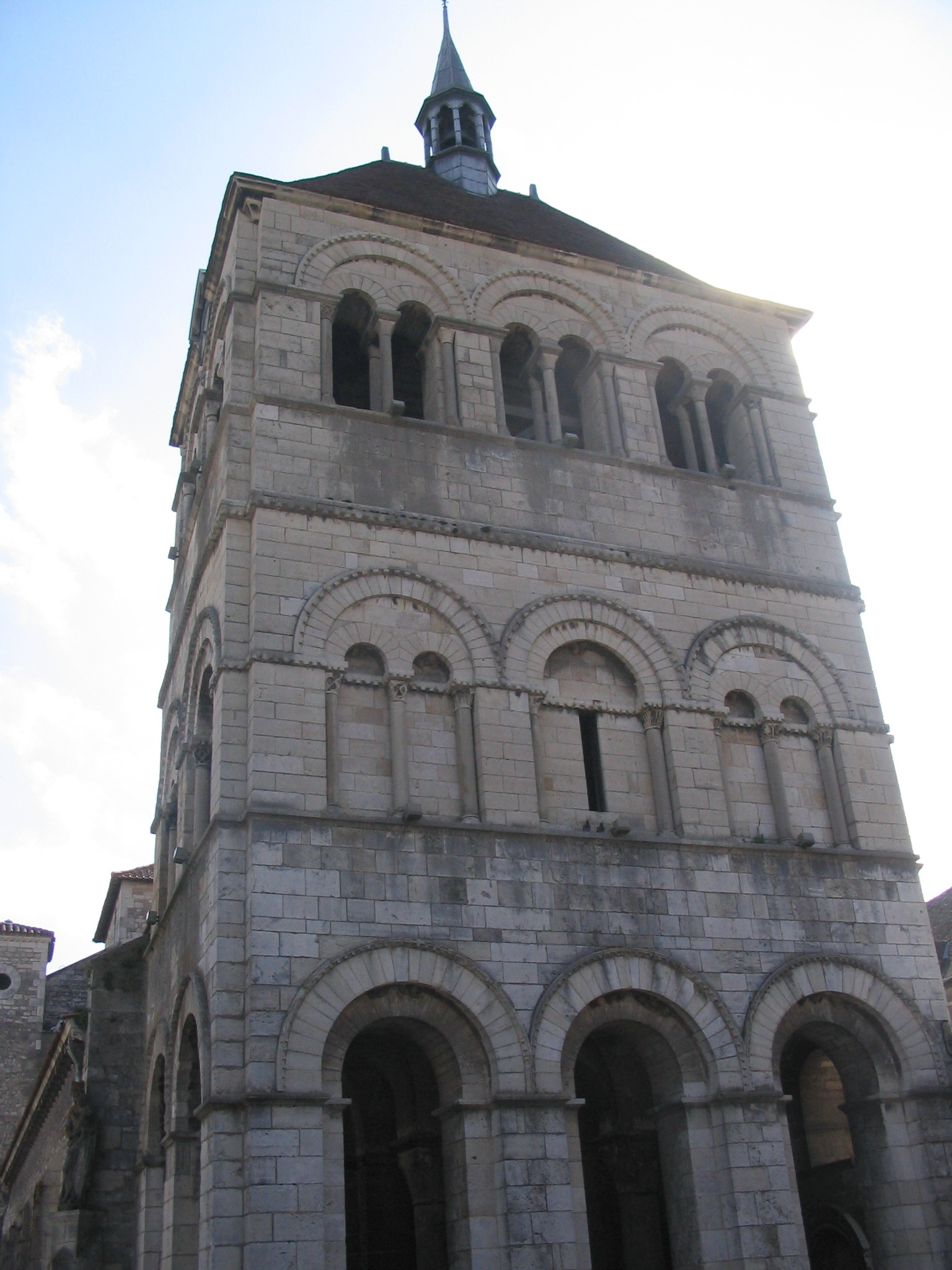 Eglise Saint-Léger, située sur la commune d'Ebreuil (Allier, 03), classée sur la liste des Monuments Historiques de France, depuis le 18 avril 1914. Le mur ouest du clocher porche est orné d'un triplet d'arcades au 1er niveau, d'un triplet de baies aveugles au 2è et d'un triplet de baies à claires-voies au dernier niveau. (PA00093092). .